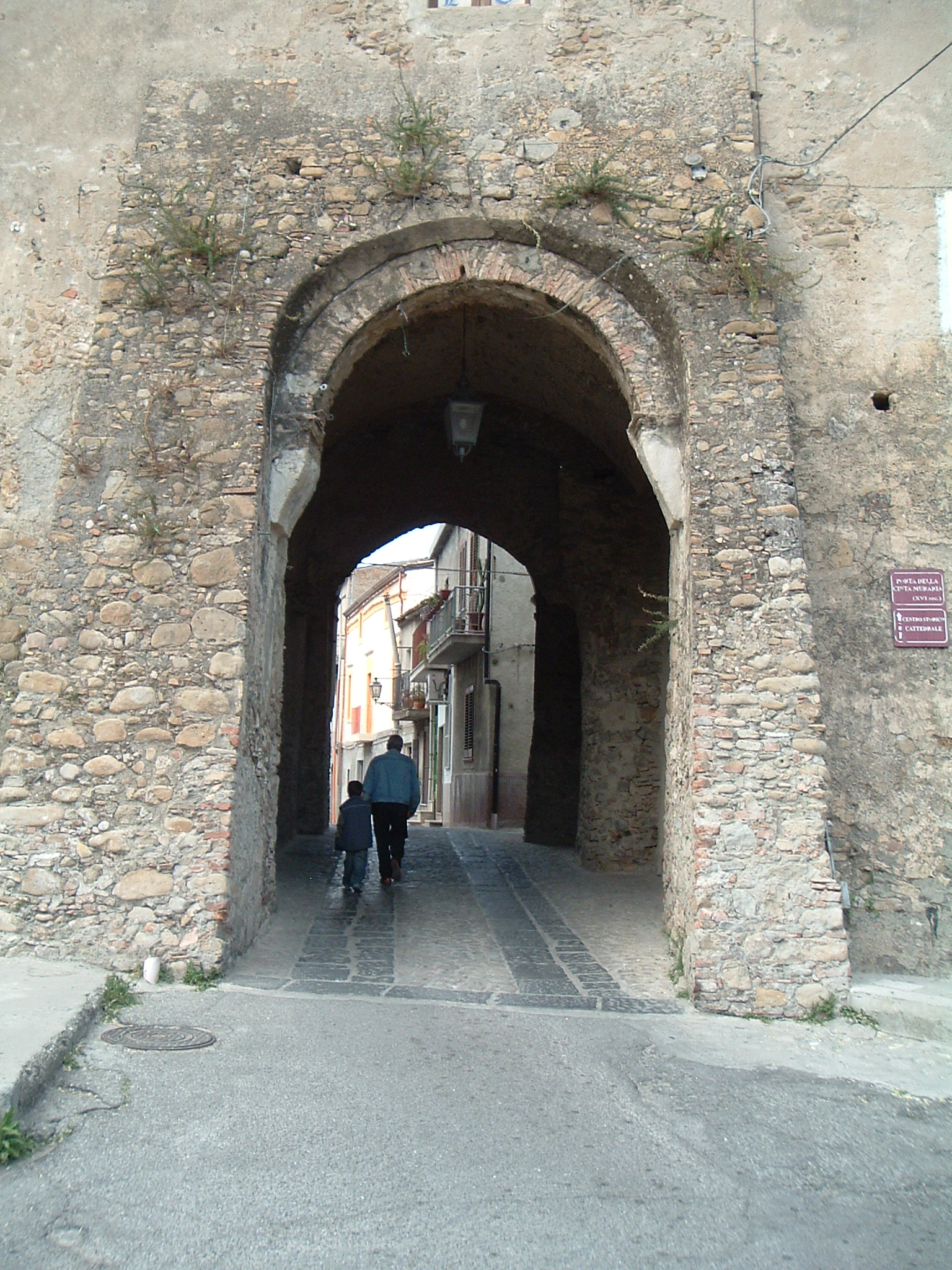 Vortix; scattata da me stesso; Ingresso al Borgo Medioevale; GFDL; ...